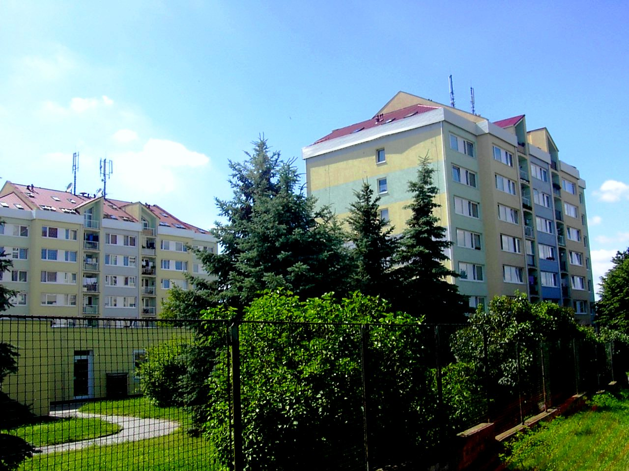 Sídliště Rohožník a radnice v Praze-Újezdě nad Lesy